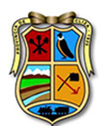 hecho por mi con la ayuda de photo shop